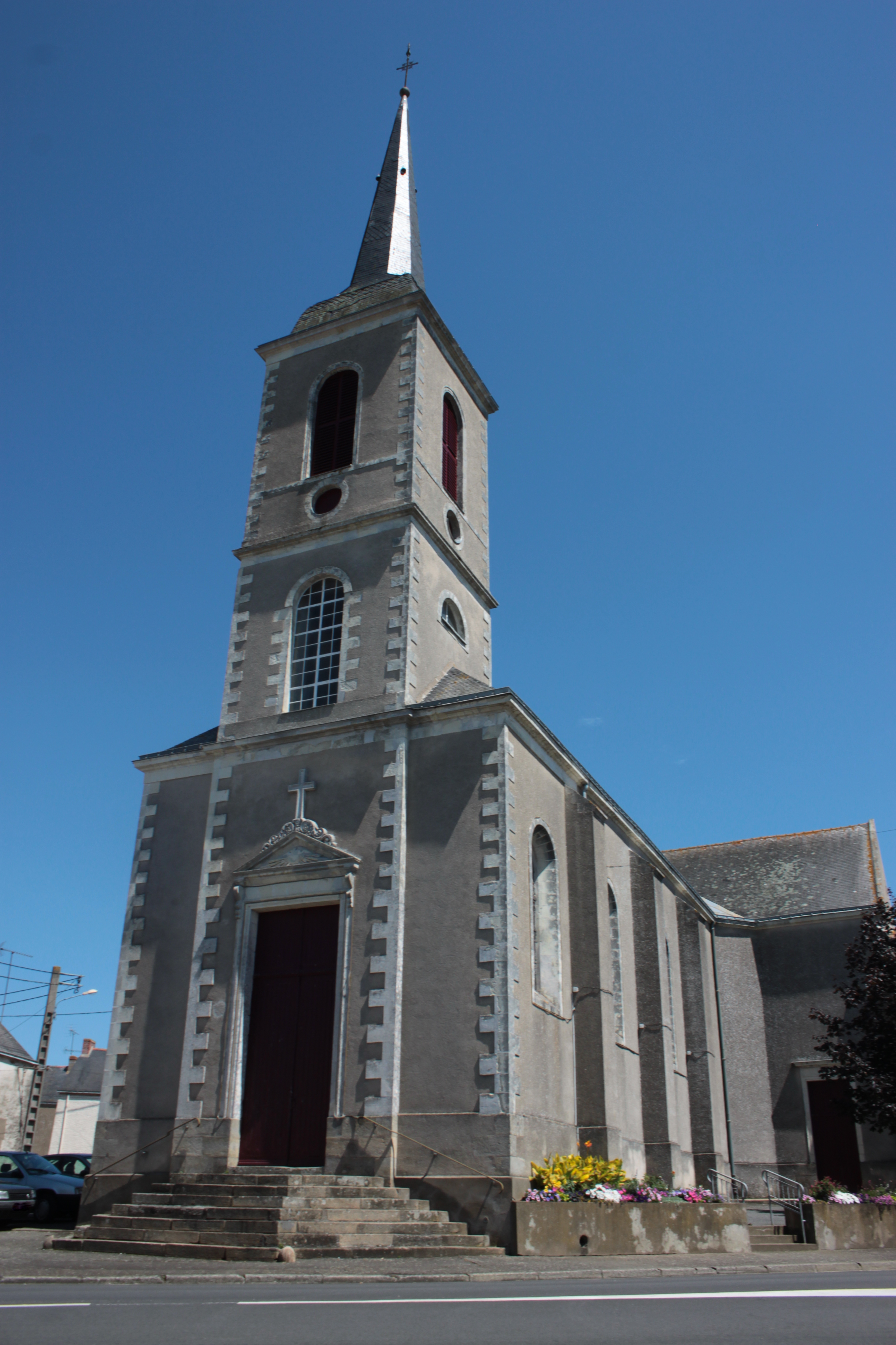 Église Saint-Solenne, 1845, Quilly.